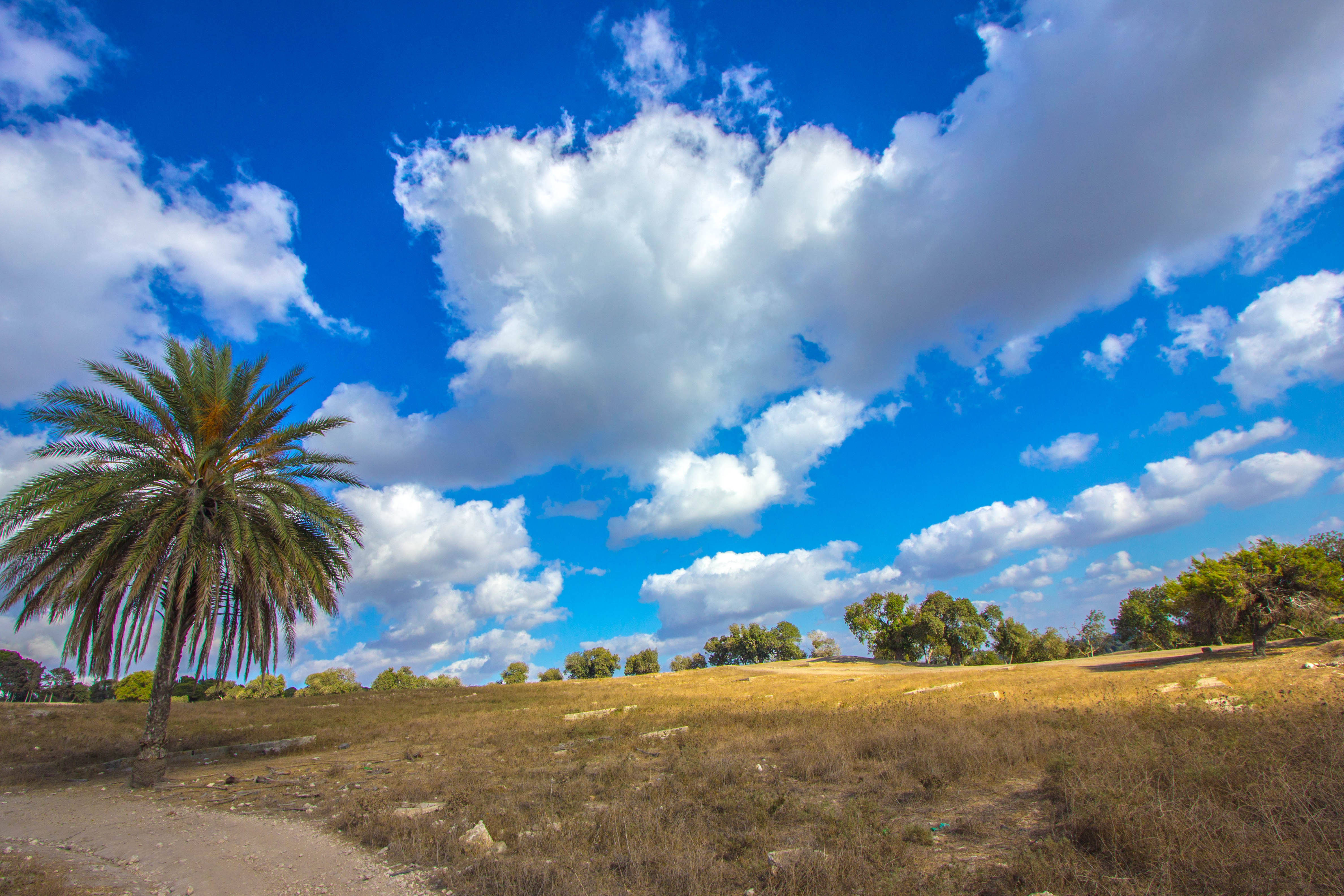 אחת הערים החשובות בצפון ארץ ישראל בעת העתיקה. היא נזכרת בתנ"ך בשם זה, ובתעודות מחוץ למקרא בשם שמע'ון. היא זוהתה בתל הקרוי בערבית "תל סַמוּנִיֶה", מתנשא כ-60 מ' מעל סביבתו, הצלע הצפון מזרחית של התל תלולה, והוא משתפל במתינות לכיוון דרום מערב. התל שוכן מצפון-מזרח למושב נהלל, בגבול עמק יזרעאל והגליל התחתון, ליד כביש הכניסה לתמרת.